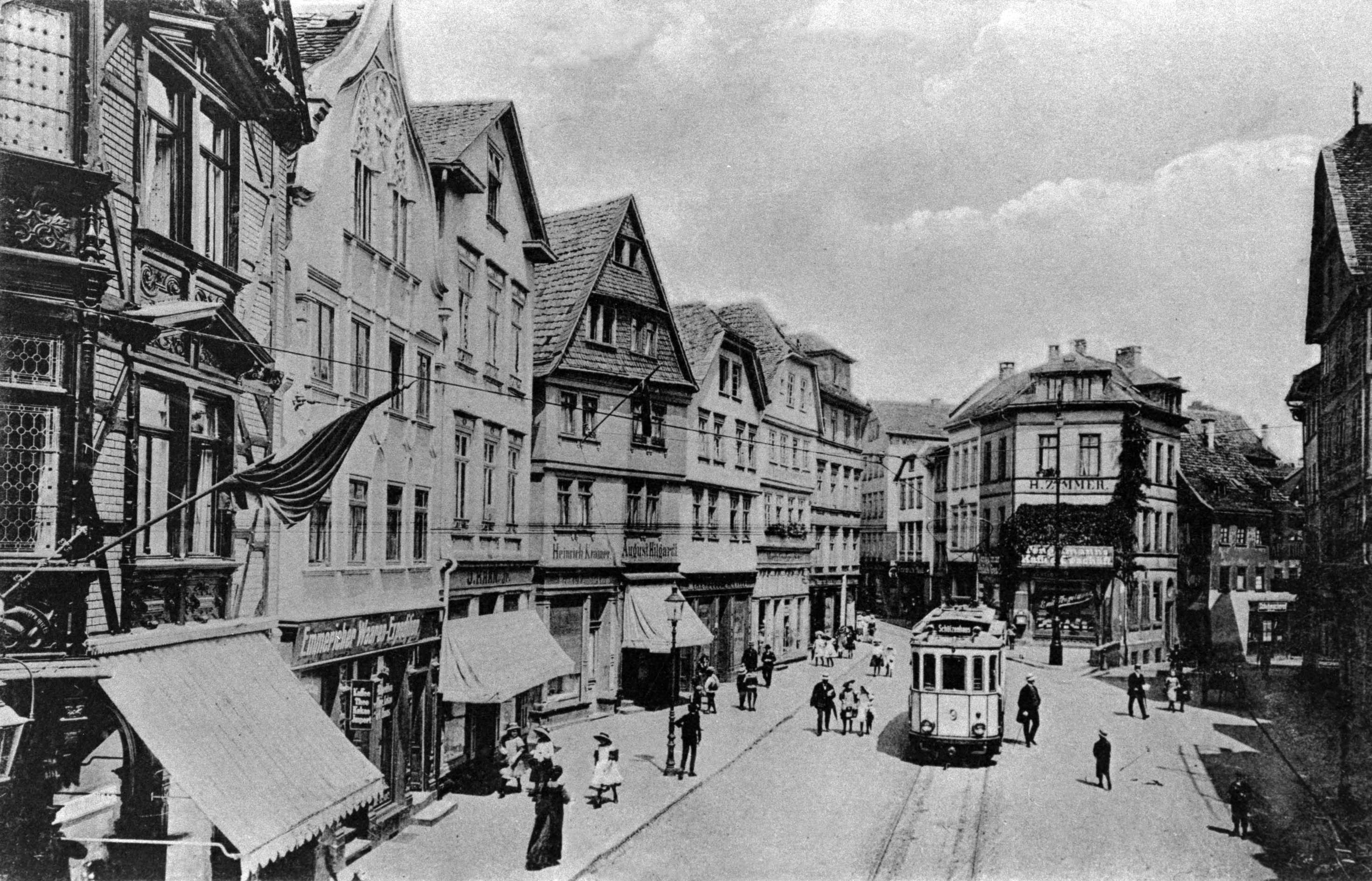 Kreuzplatz in Giessen, Germany; around 1920